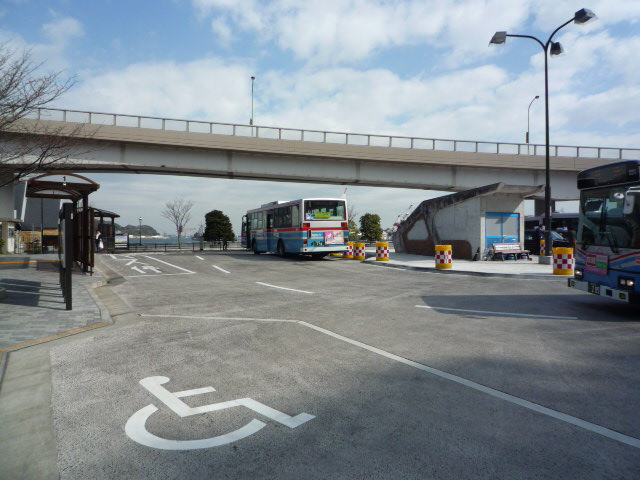 バスターミナルを撮影。